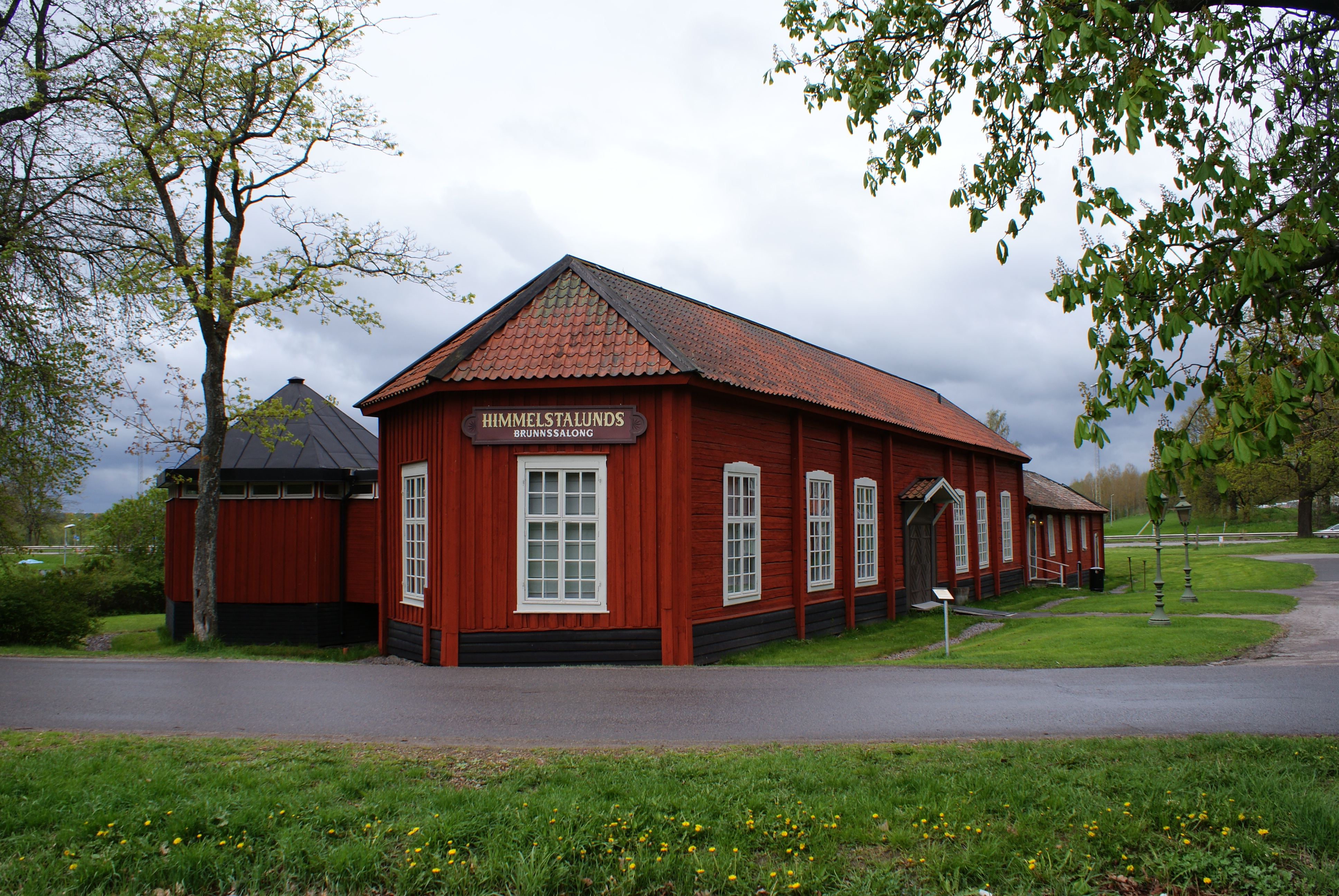 NORRKÖPING HIMMELSTADLUND 1:1 - husnr 5 (brunnssalong) in Norrköping